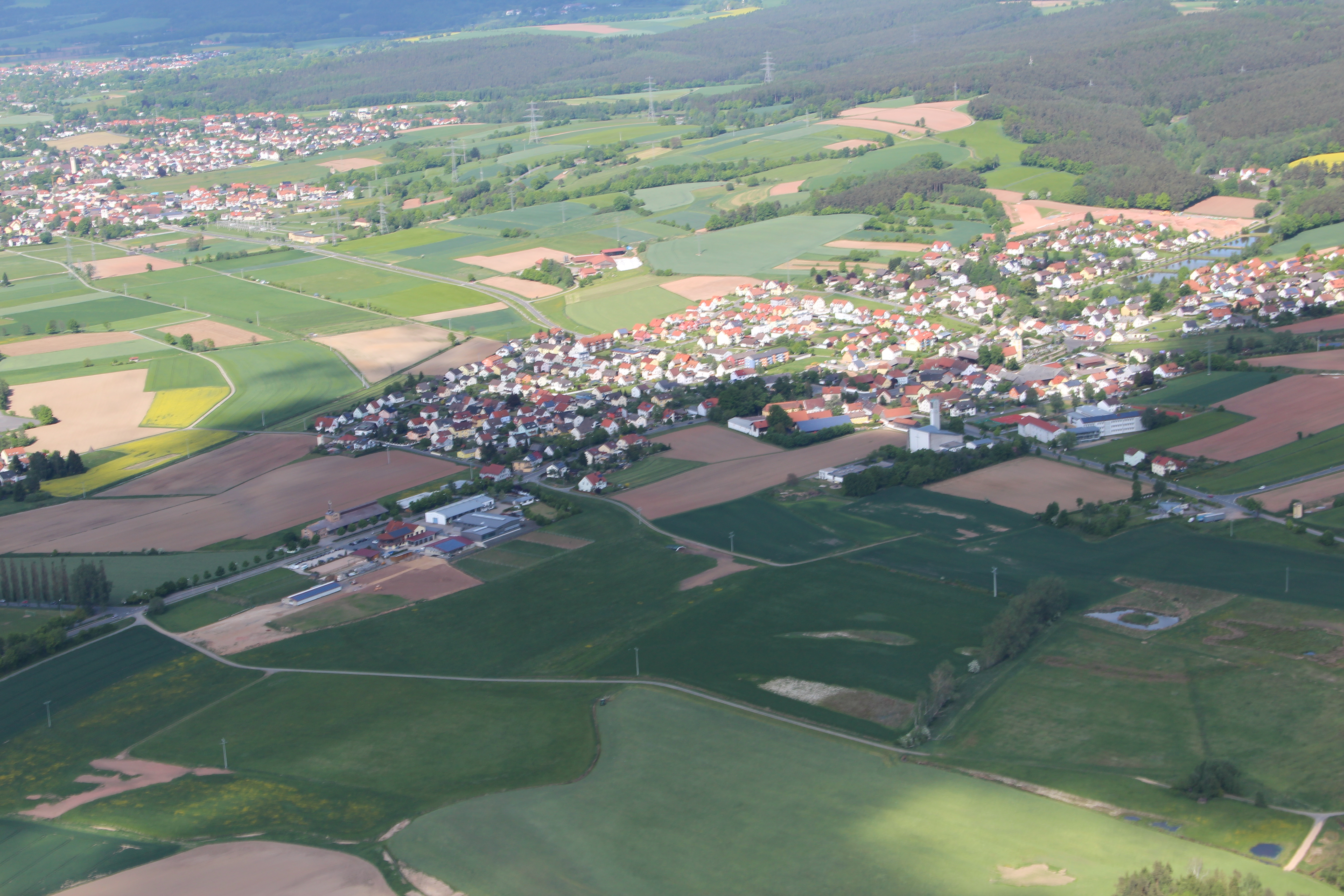 Pirk (Landkreis Neustadt an der Waldnaab, Oberpfalz)